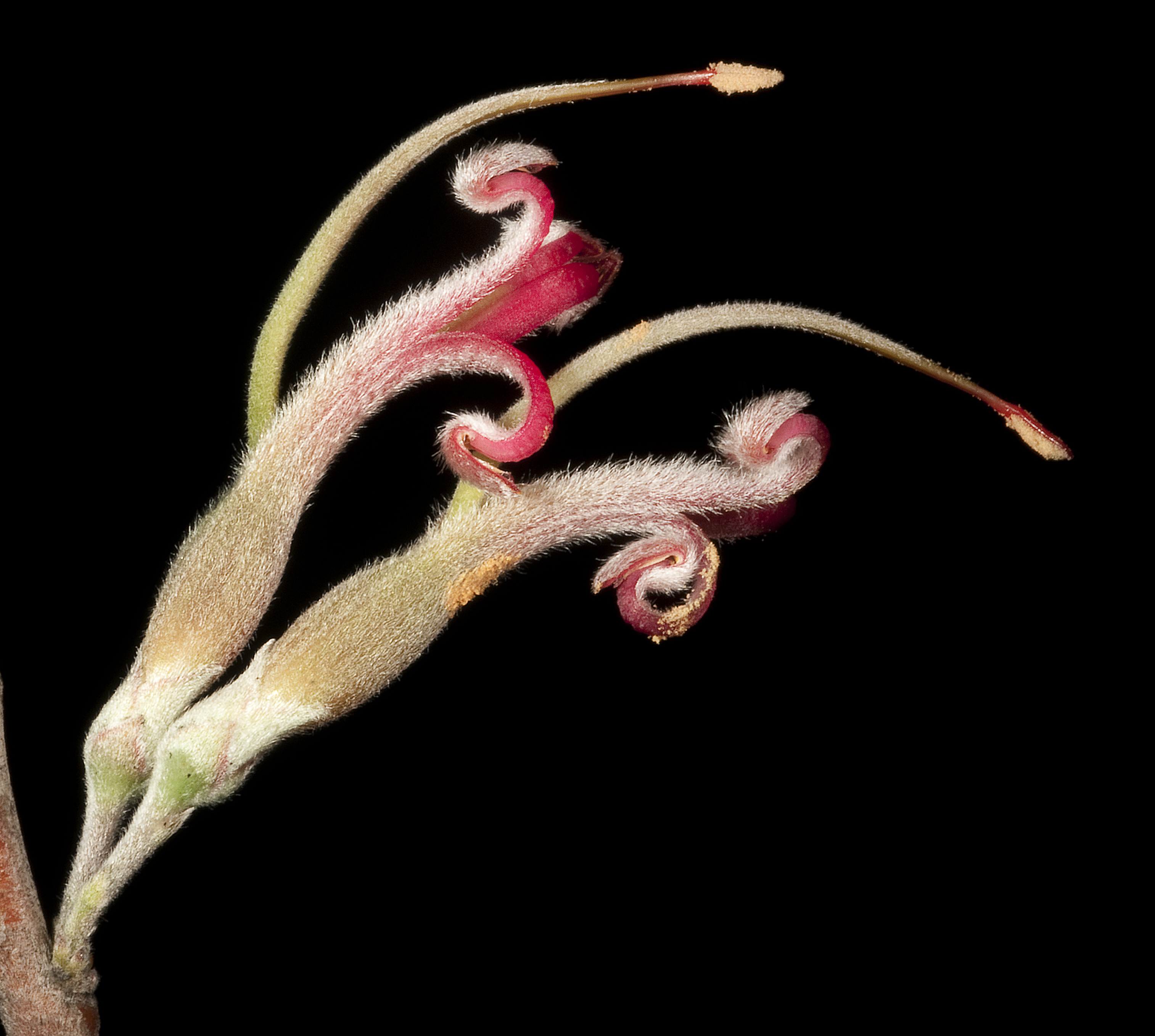 KRT4277